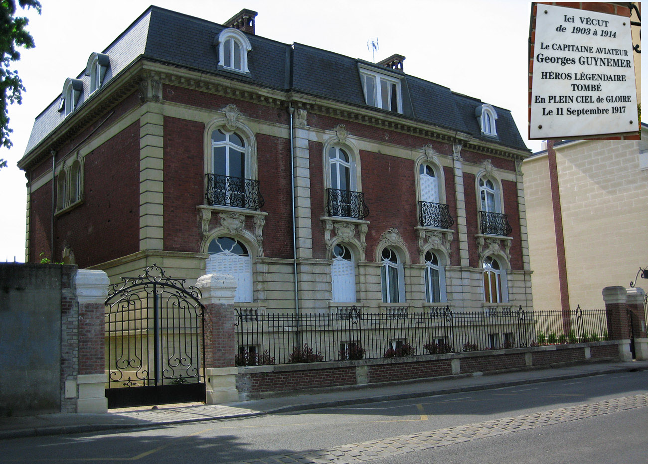 Située au 112 rue Saint Lazare, Compiègne (Oise)